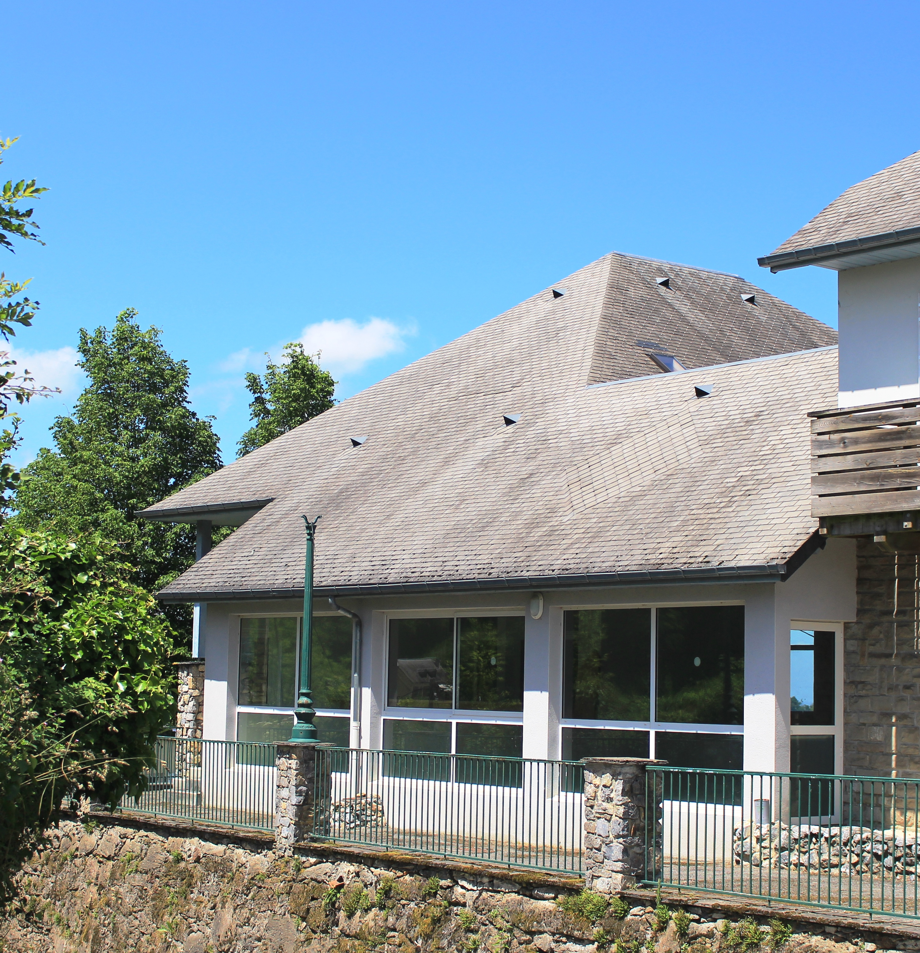 Salle des fêtes de Neuilh (Hautes-Pyrénées)